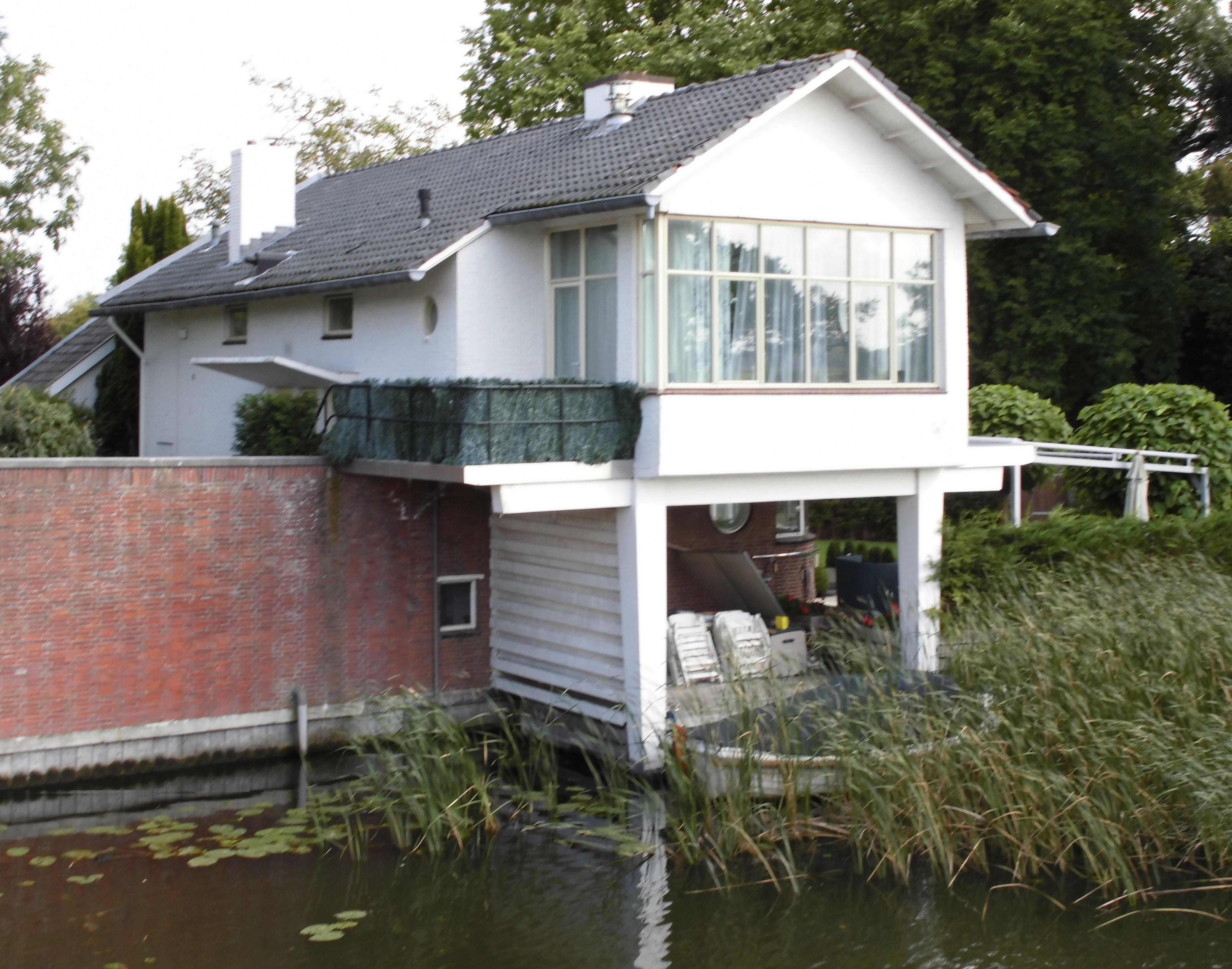 Brugwachterswoning vd Vreelandbrug te Vreeland, architect W.M. Dudok